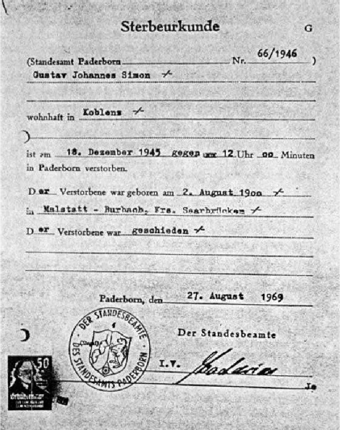 Kopie vum Gustav Simon sengem Acte de décès.